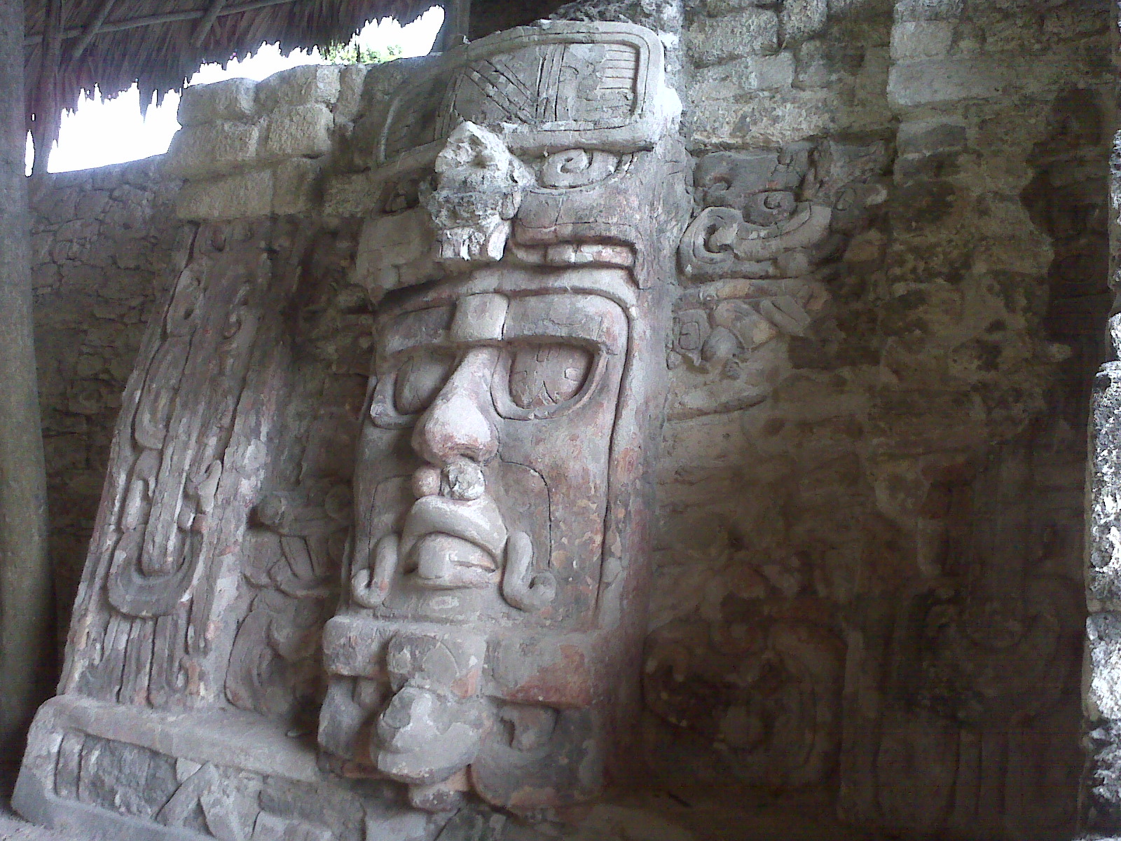 En las pirámides de Kohunlich, Quintana Roo, es posible encontrar en la pirámide principal, los mascarones sagrados del dios solar Kinich Ahau, que flanquean a ambos lados ésta bella pirámide maya.